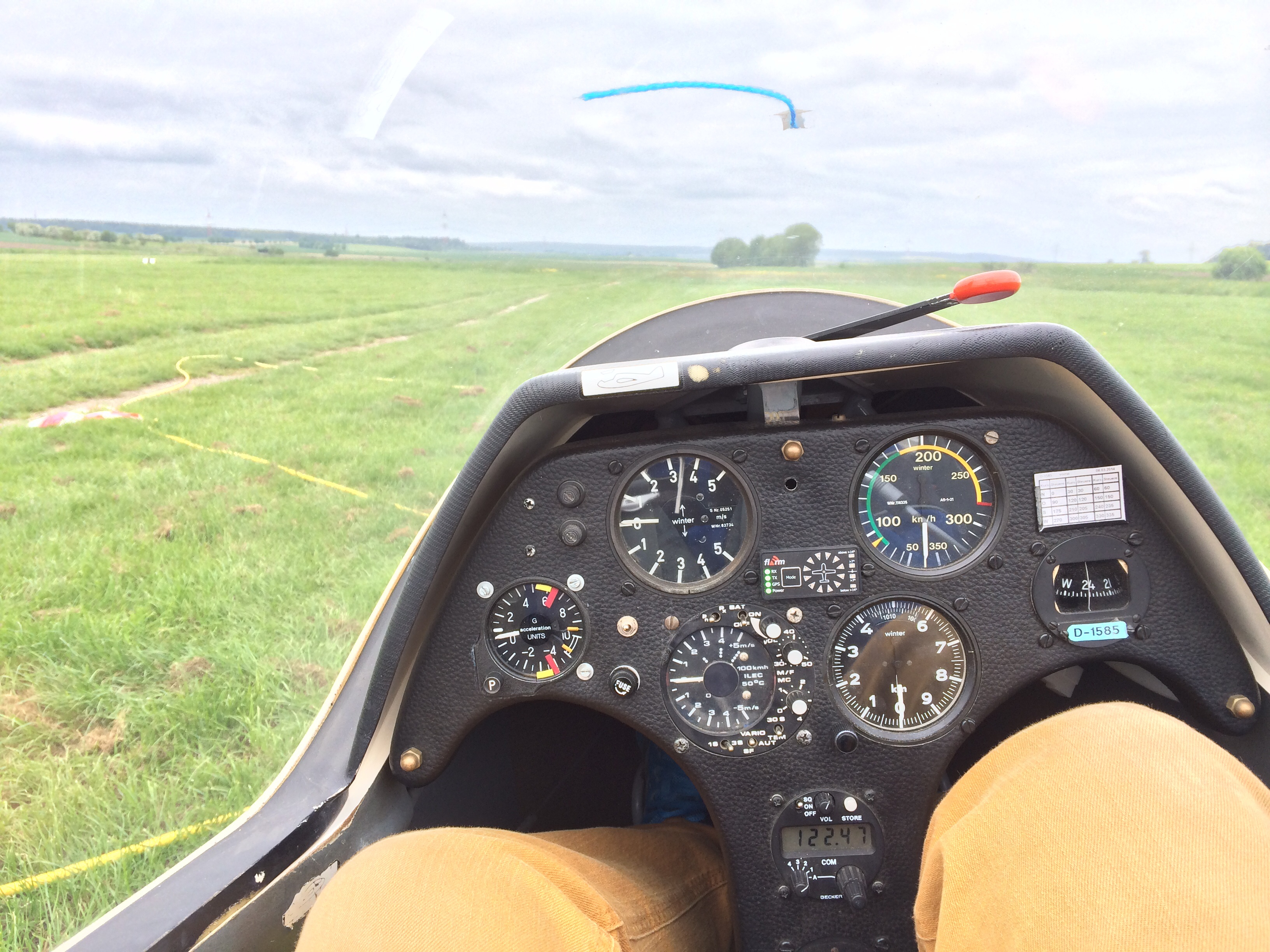 Nicht serienmäßiges Instrumentenbrett für größere Personen mit Vario, E-Vario, Fahrtenmesser, Höhenmesser, Funkgerät, G-Kraft-Messer und Kompass